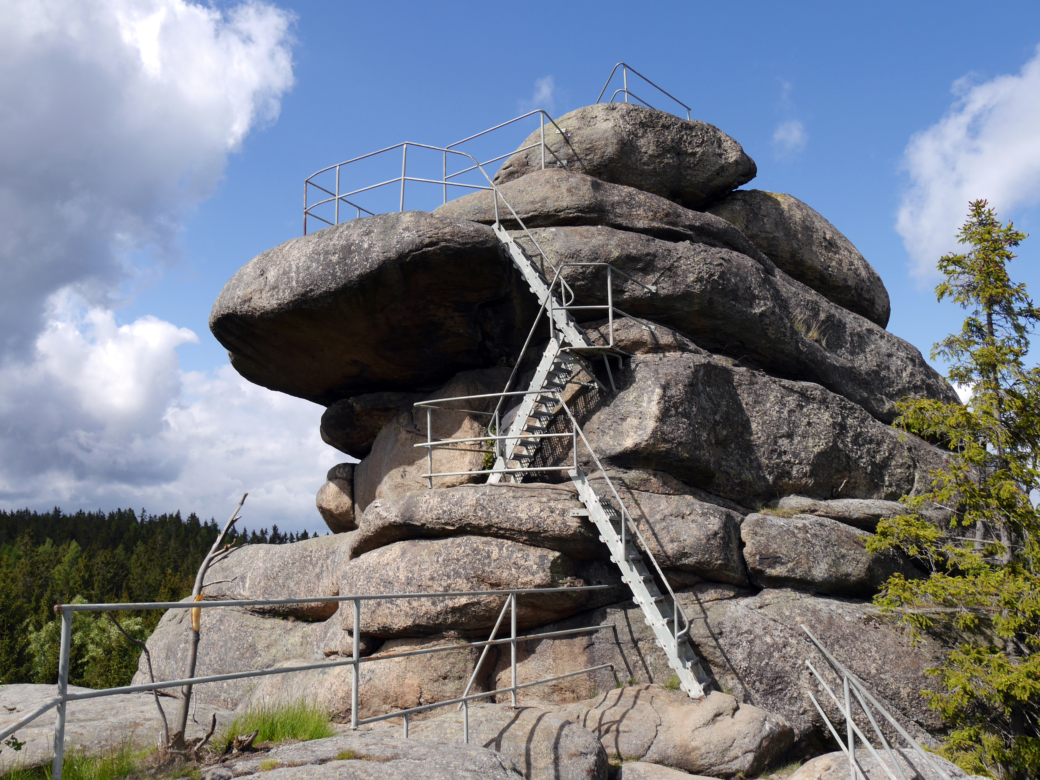 Begehbarer Gipfel des Ottofelsens im Harz nahe Wernigerode